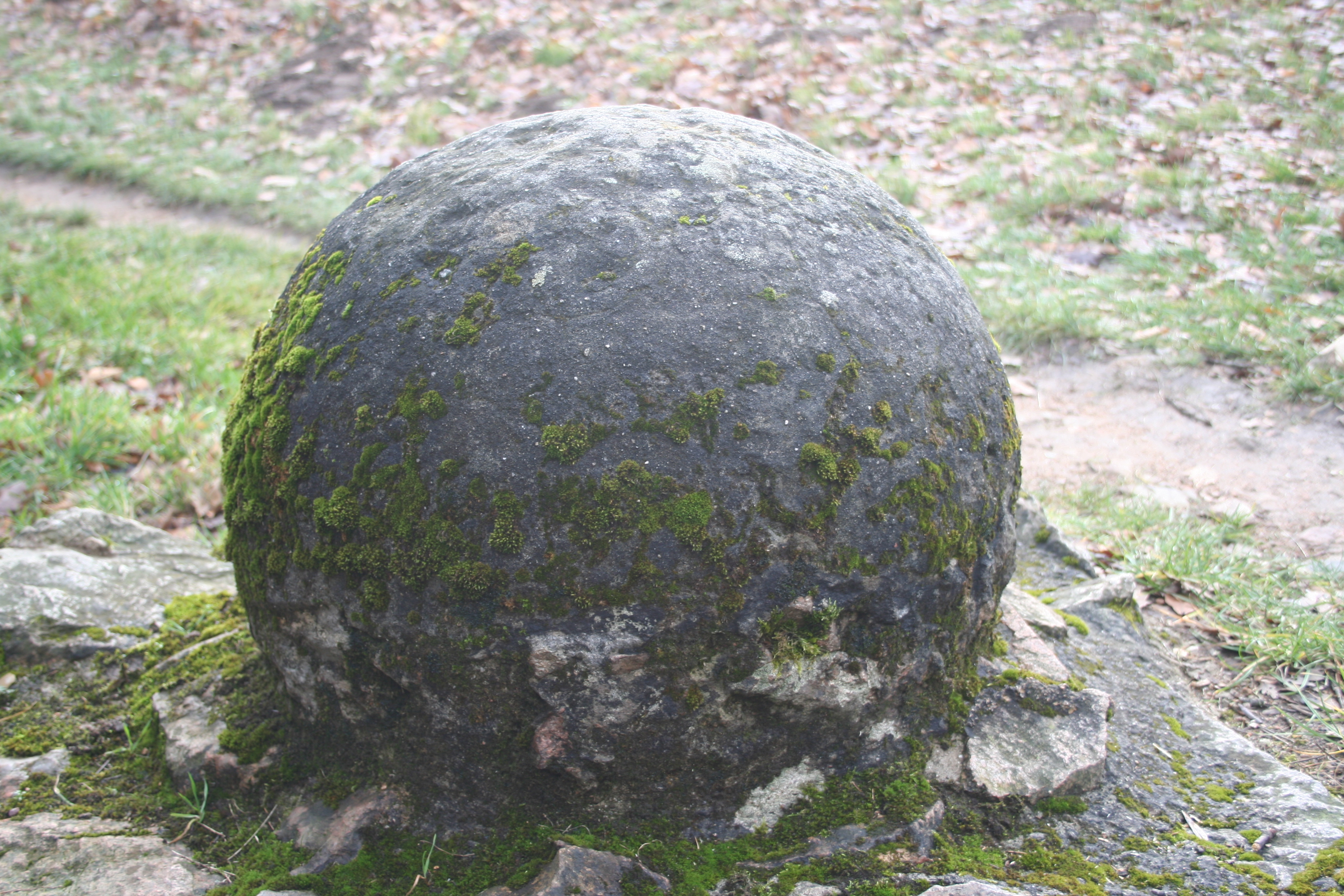 Wurfgeschoss für die große Blide / Blidenstein auf Burg Tannenberg, Jugenheim, Seeheim-Jugenheim, Hessen, Deutschland